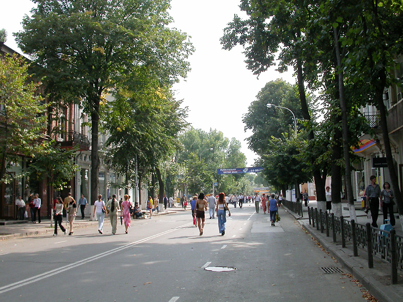 Krasnodar, Red street